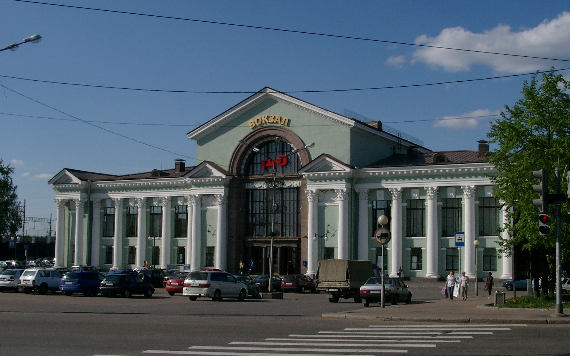 Здание вокзала станции Выборг, Ленинградская область, Россия.